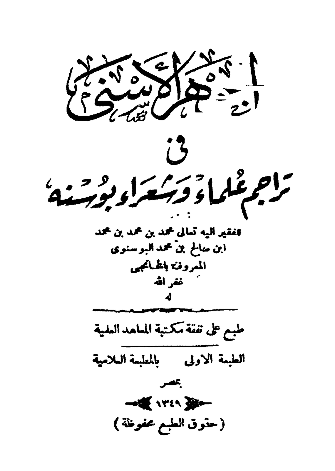 غلاف كتاب الجوهر الأسنى في تراجم علماء وشعراء بوسنة - محمد الخانجي البوسنوي - الطبعة الأولى المطبعة العلامية - بمصر - ١٣٤٩ هـ